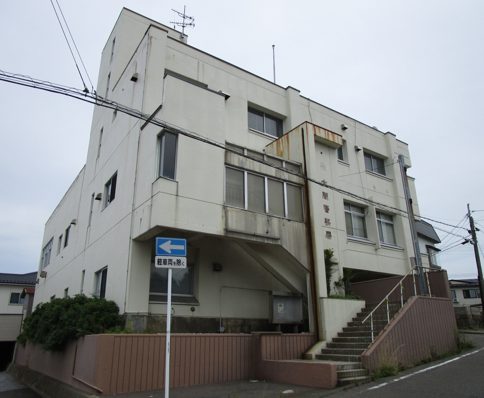 旧大間警察署（青森県下北郡大間町）